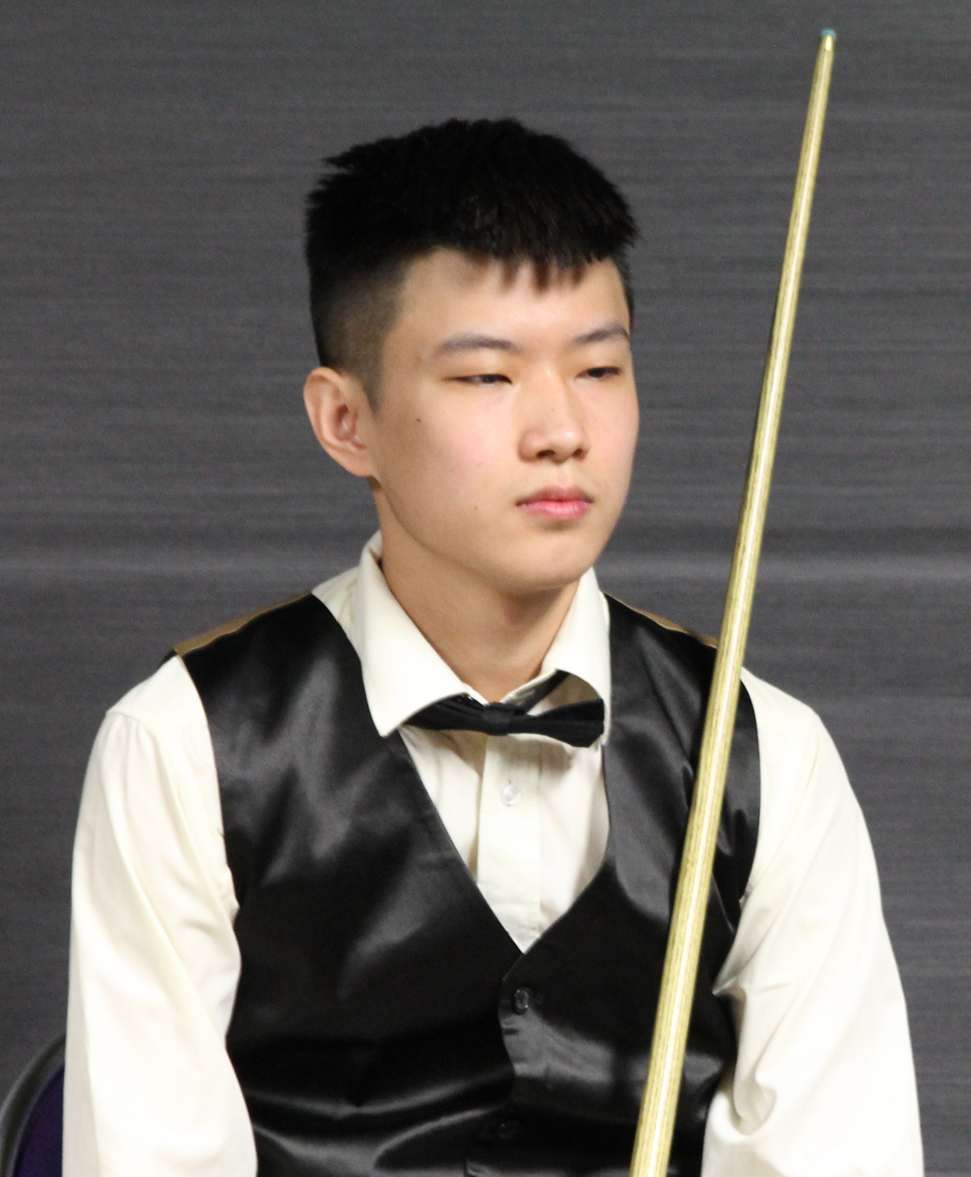 Zhao Xintong beim Paul Hunter Classic 2016